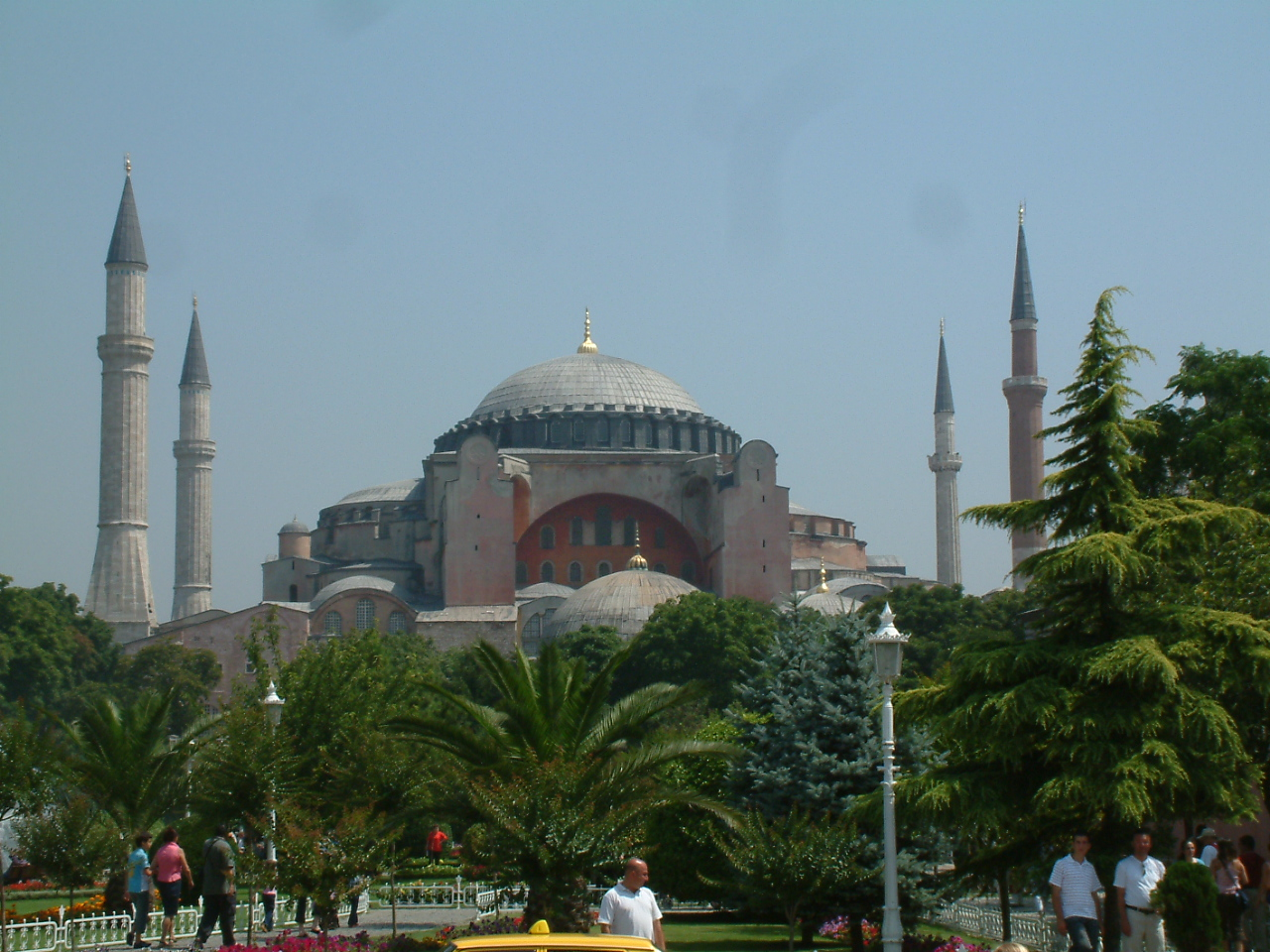 Hagia Sophia